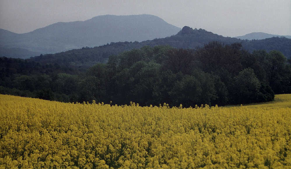 Im Zentrum des Böhmischen Mittelgebirges Fotograf: Walter J. Pilsak, Waldsassen Copyright Status: GNU Freie Dokumentationslizenz